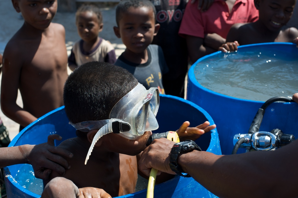 Andavadoaka